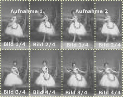 Motiv: Schema der Aufteilung einer Kollodium-Nassplatte für Visitenkartenporträts um 1860